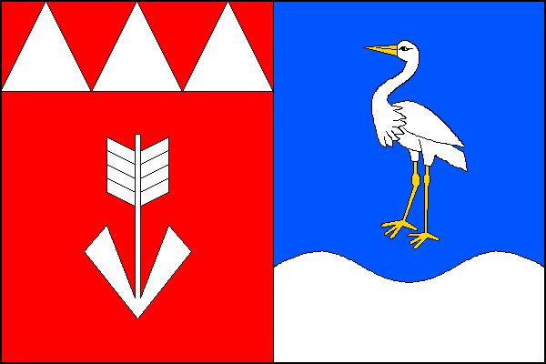 Vlajka obce Třemešná